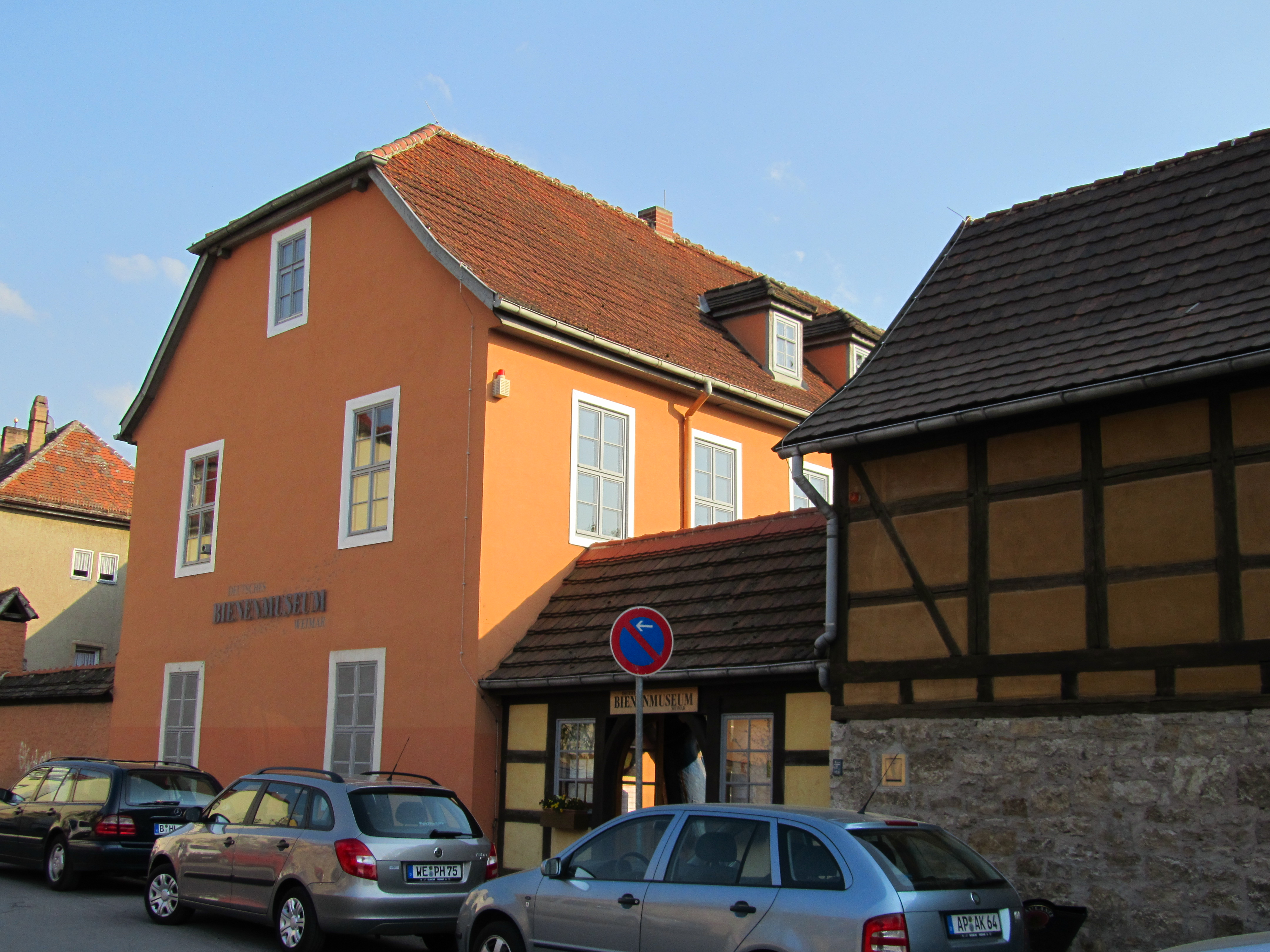 Das Bienenmuseum in Oberweimar (Thüringen).